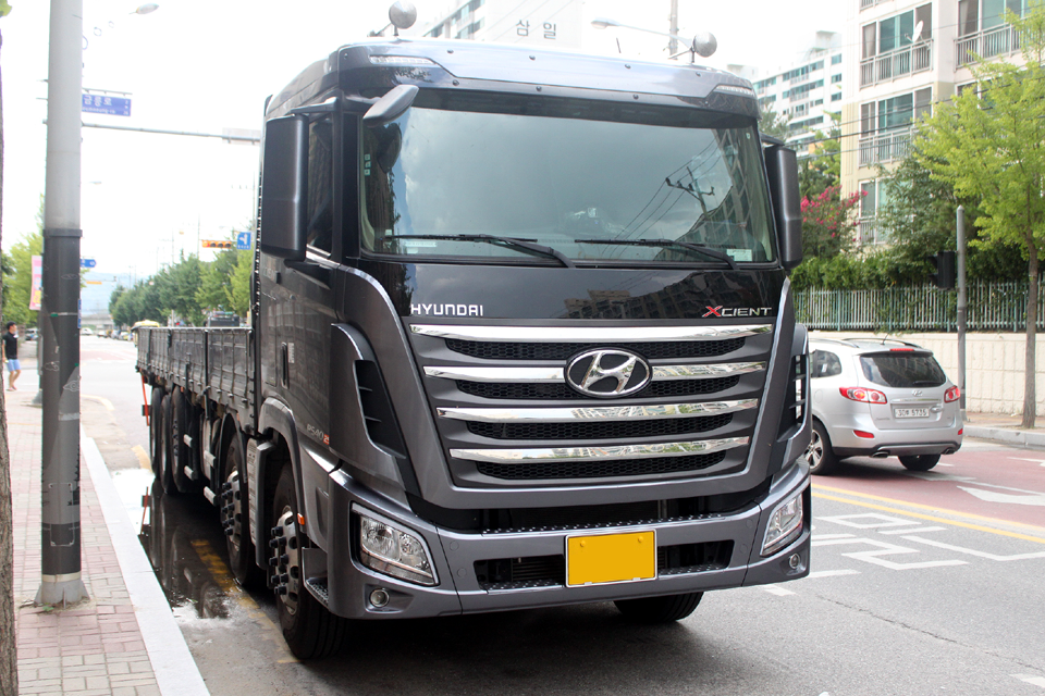 현대자동차 엑시언트 25.5톤 카고 정측면